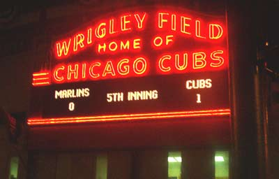 Wrigley Field Sign